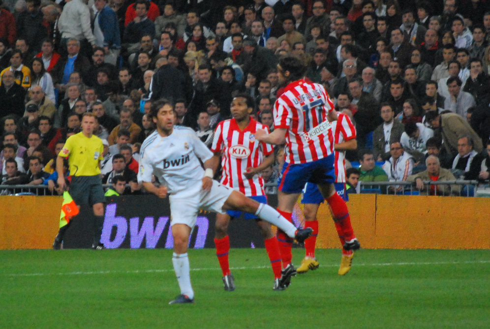 Derby Bernabeu